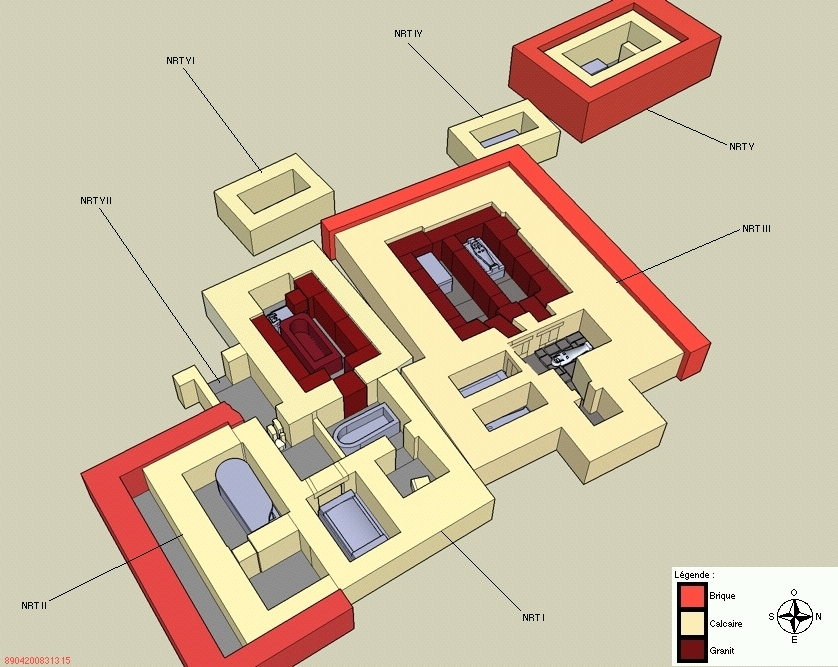 Vue en élévation de la nécropole royale de Tanis - XXIe et XXIIe dynasties égyptienne. More infos in notes (ref: Georges Goyon, La découverte des trésors de Tanis].